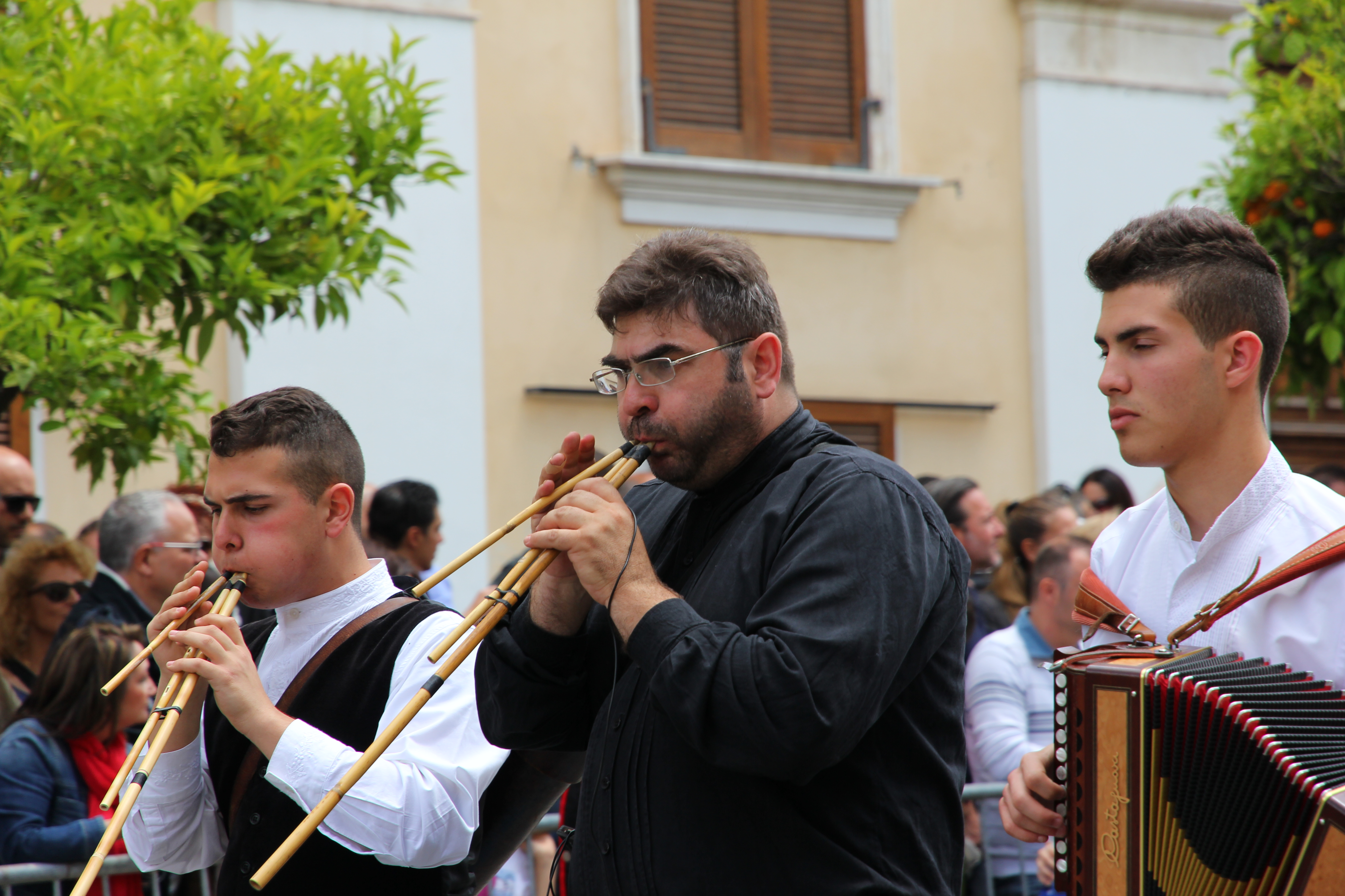 Costume tradizionale